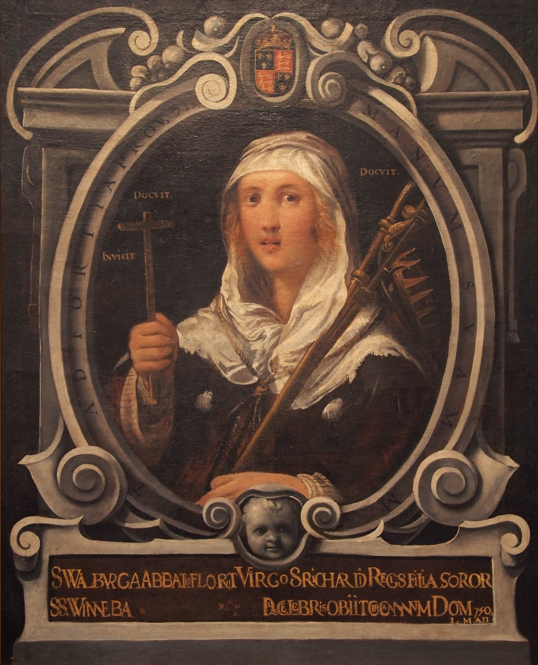 Santa Walburga. Obra de Juan de Roelas, c. 1605. Iglesia de San Miguel and San Julián, Valladolid.